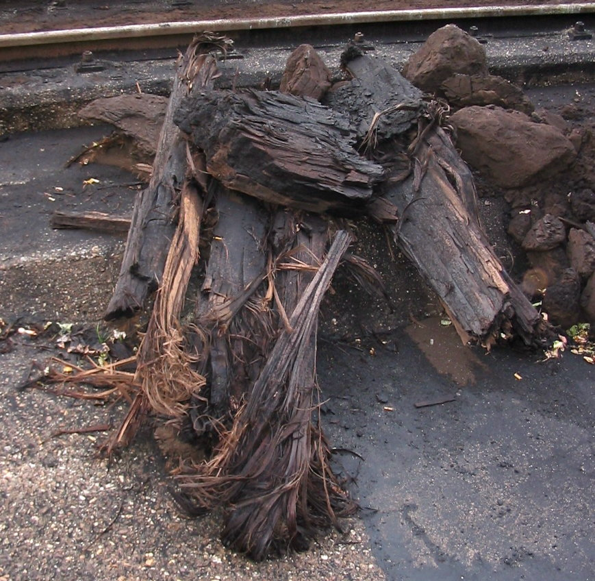 Diese Baumstümpfe waren in der Braunkohle eingeschlossen und wurden im Kraftwerk vor der Verbrennung aussortiert.